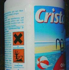 Gefahrensymbol auf Chlorungsmittel Bild steht unter